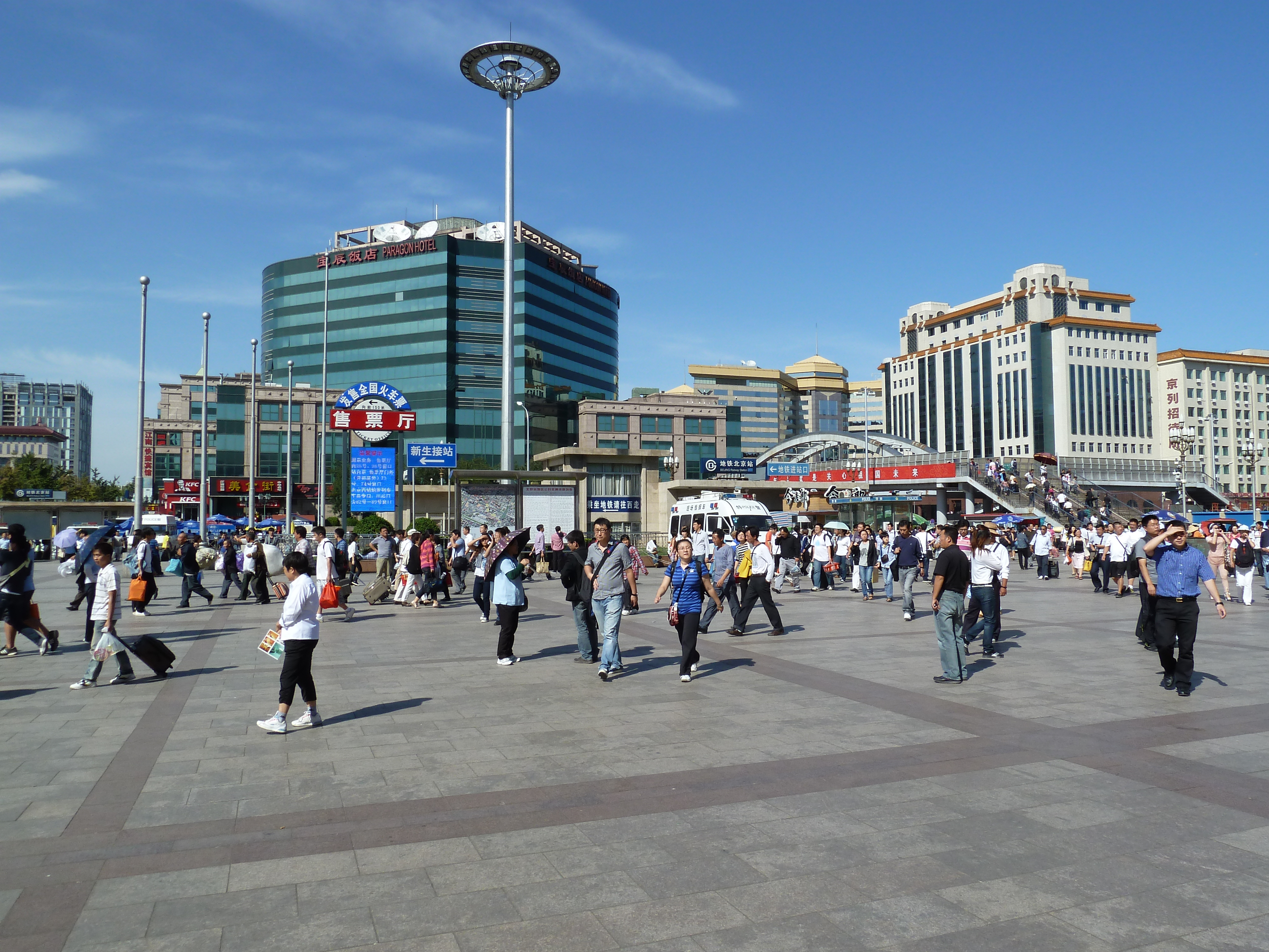 De la Mongolie (Xilin Gol) à la Gare centrale de Pékin, Chine